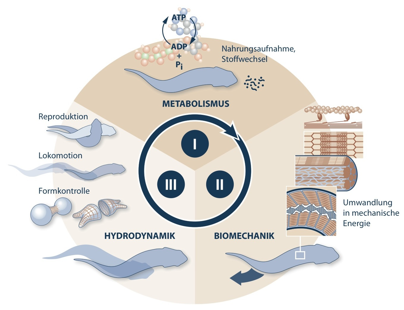 Bionomie-Kreislauf der Organismen: Eine organismus-zentrierte Morphologie betrachtet Lebewesen ganzheitlich, d.h. als energiewandelnde Konstruktionen, die (a) mechanisch und chemisch funktionieren, (b) sich selbst versorgen (autopoietisch sind), (c) sich selbst erstellen (autoformativ sind), und (d) sich selbst reproduzieren. Diese Selbstversorgungsleistung zusammen mit dem Stoff- und Energiewandel des Organismus nennt man „Bionomie“; der Vorgang selbst lässt sich im Bionomiekreislauf darstellen (siehe nebenstehende Abbildung). [1] Namensnennung: Manfred Grasshoff, Michael Gudo, Tareq Syed